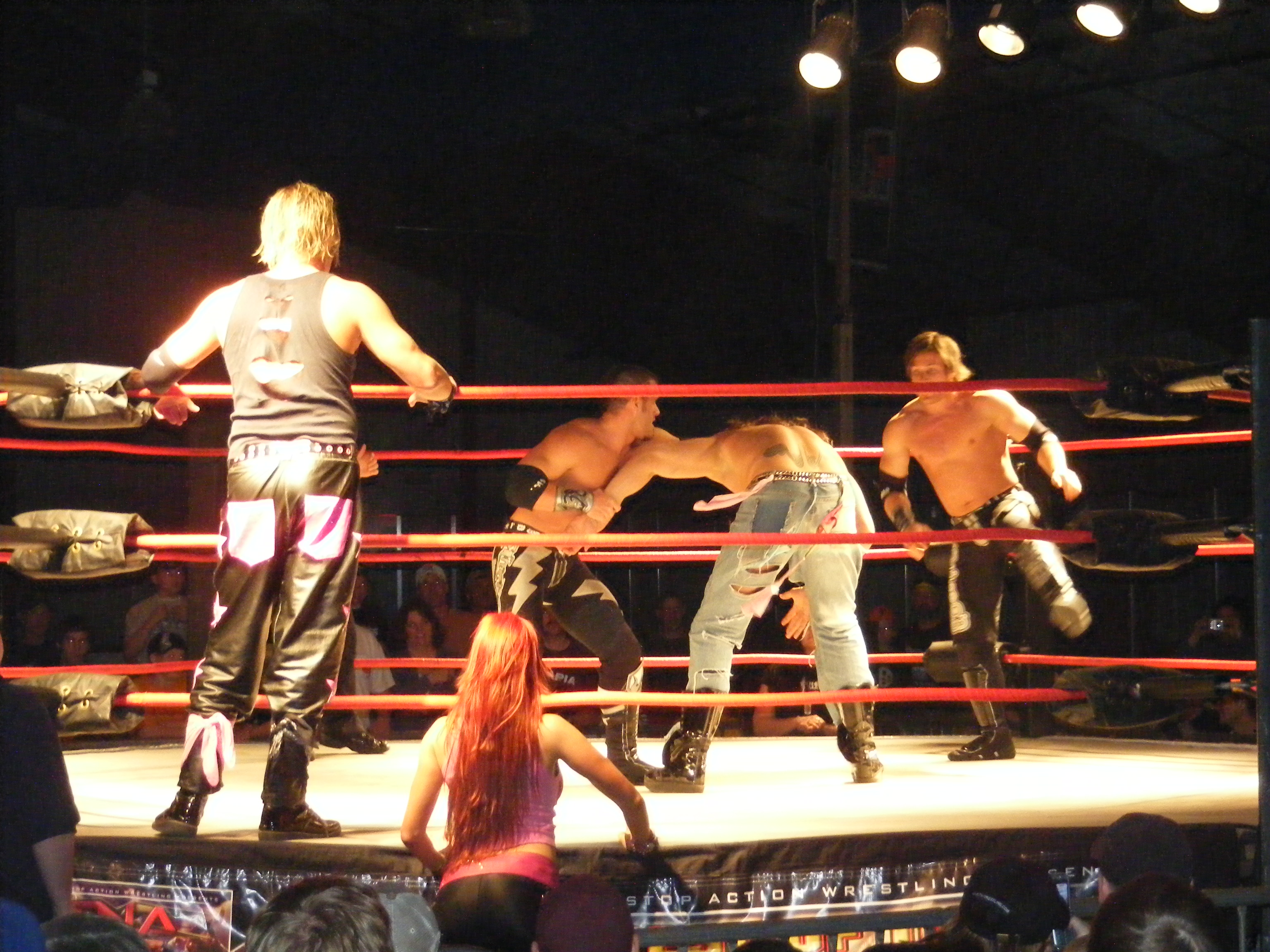 Motor City Machine Gund aplicando su ASCS Rush.